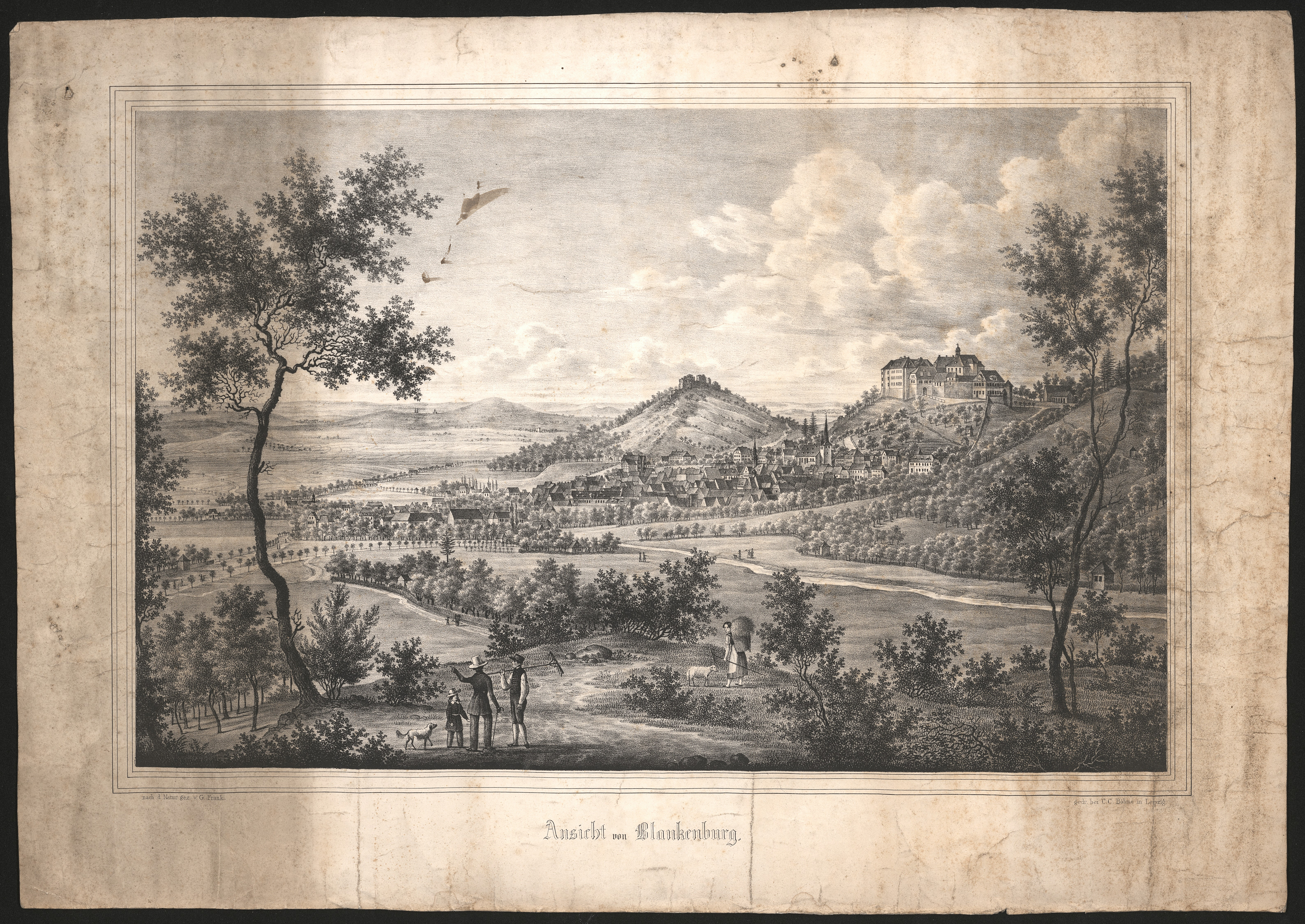 Archives du département du Rhône et de la métropole de Lyon, fonds Comarmond, 11 J 71.